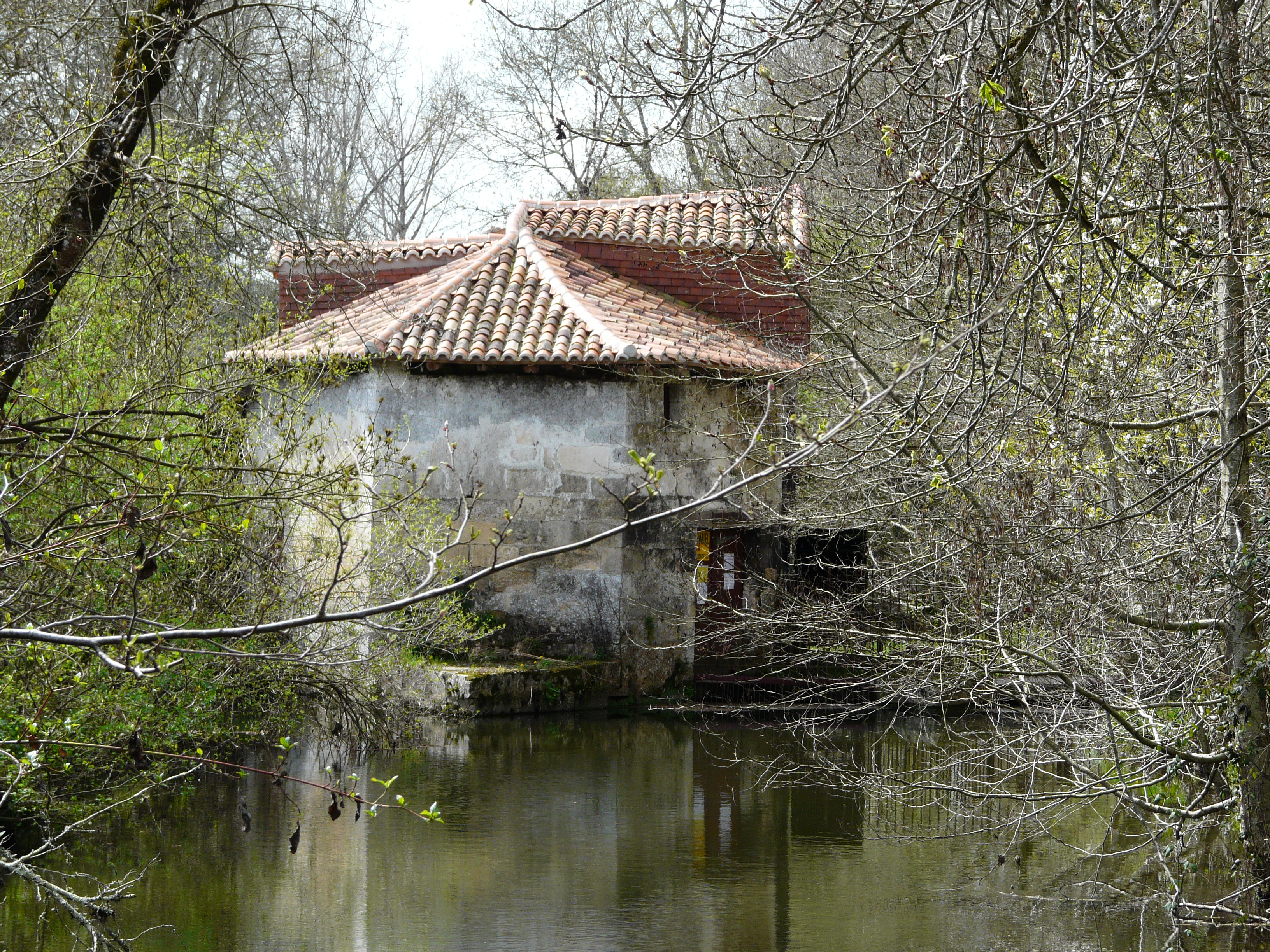 Le moulin de Rochereuil sur une dérivation de la Dronne, Grand-Brassac, Dordogne, France.